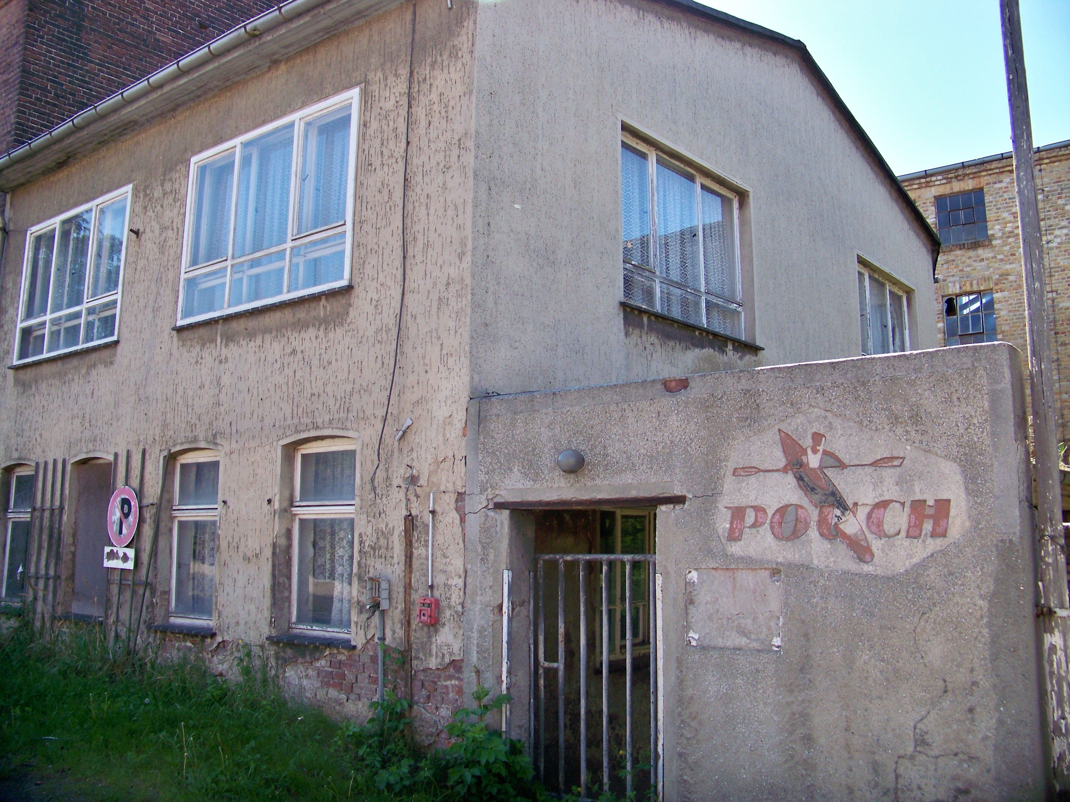 Bootefabrik in Pouch